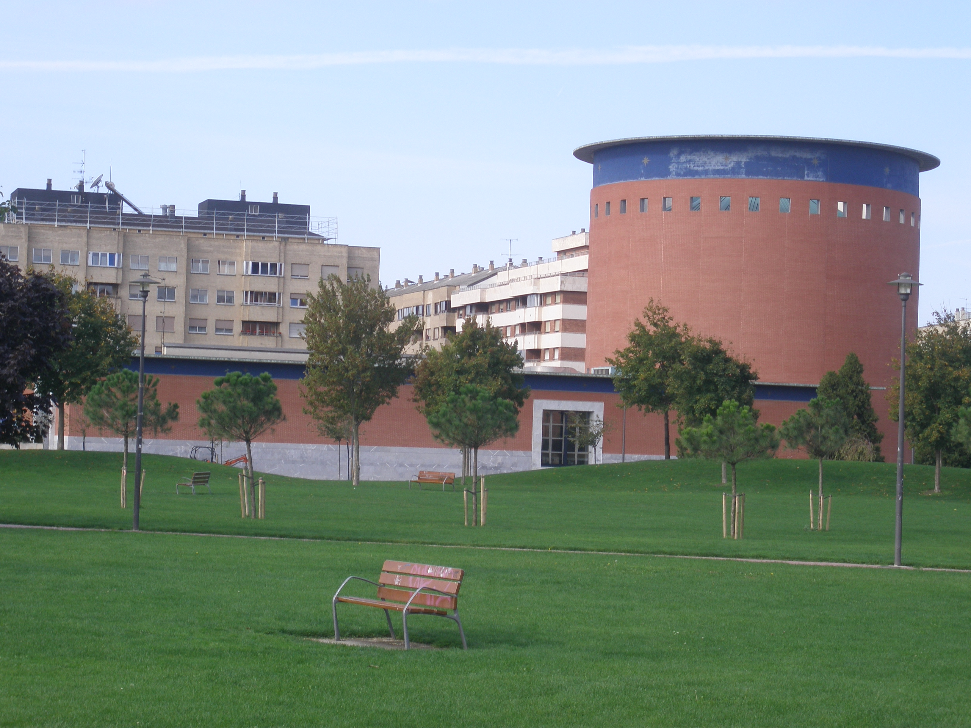 PlanetarioPamplona